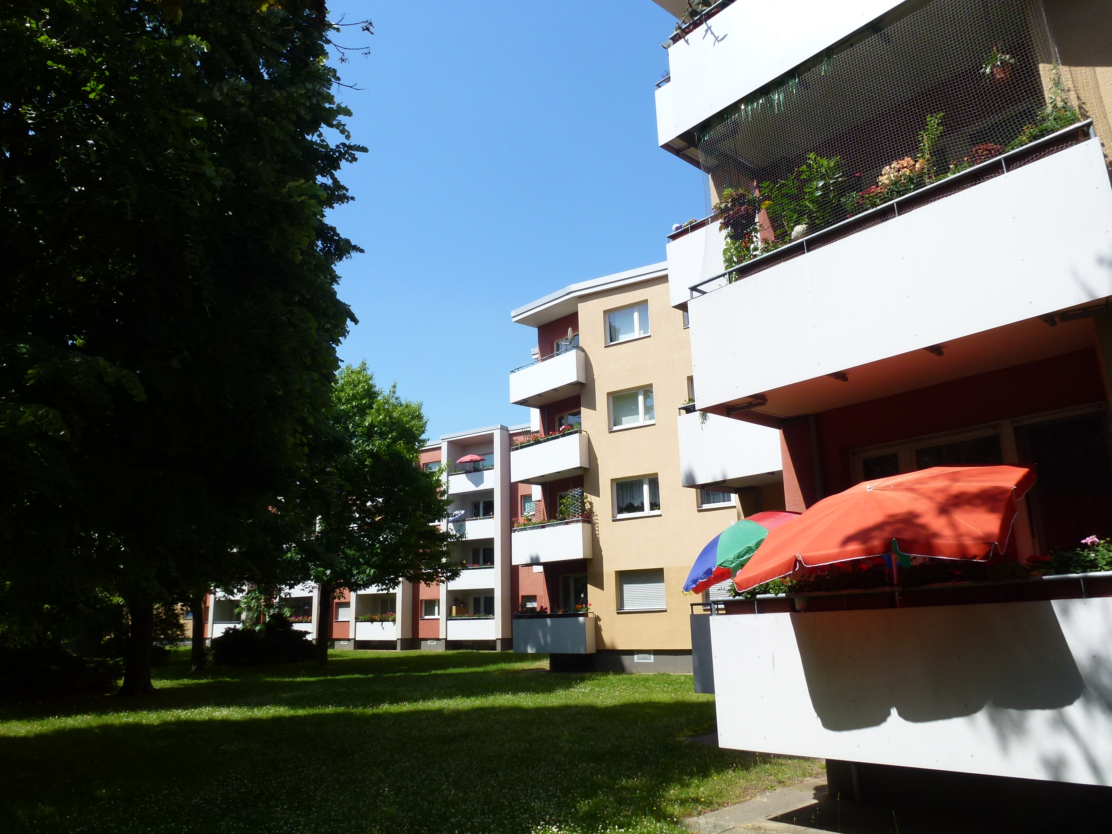 Berlin-Tempelhof Mohnickesteig